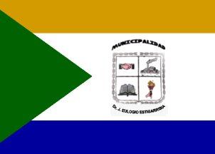 En el año 1983, en la reciente creada “Municipalidad de 3ª Categoría” presidida por el Señor José González Melgarejo y a solicitud de éste, el Sr. Úrsulo González, bosquejó el primer Escudo Municipal que fue aprobado por unanimidad por los Miembros de la Junta, dicho Escudo. Fue diseñado en bronce y utilizado por casi tres Jefes Comunales. Fue ratificado y reconocido por Ordenanza Municipal Nº 5 de fecha 21 Octubre del año 1991.